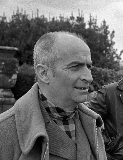 L'acteur français Louis de Funès lors du tournage du film L'Homme orchestre, dans un parc de Bassano Romano, en Italie, en mars 1970.